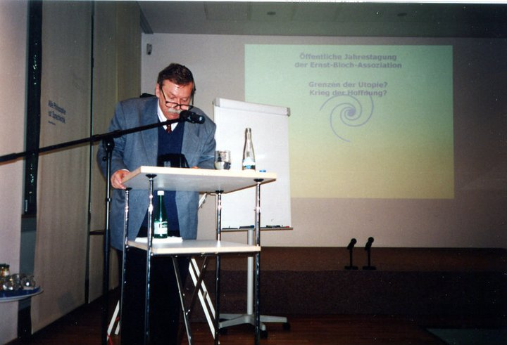 Arno Munster - Conférence au Centre Ernst Bloch - Ludwighafen - Allemagne